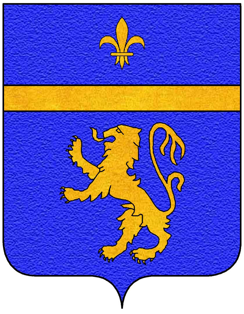 Stemma della famiglia Zametti